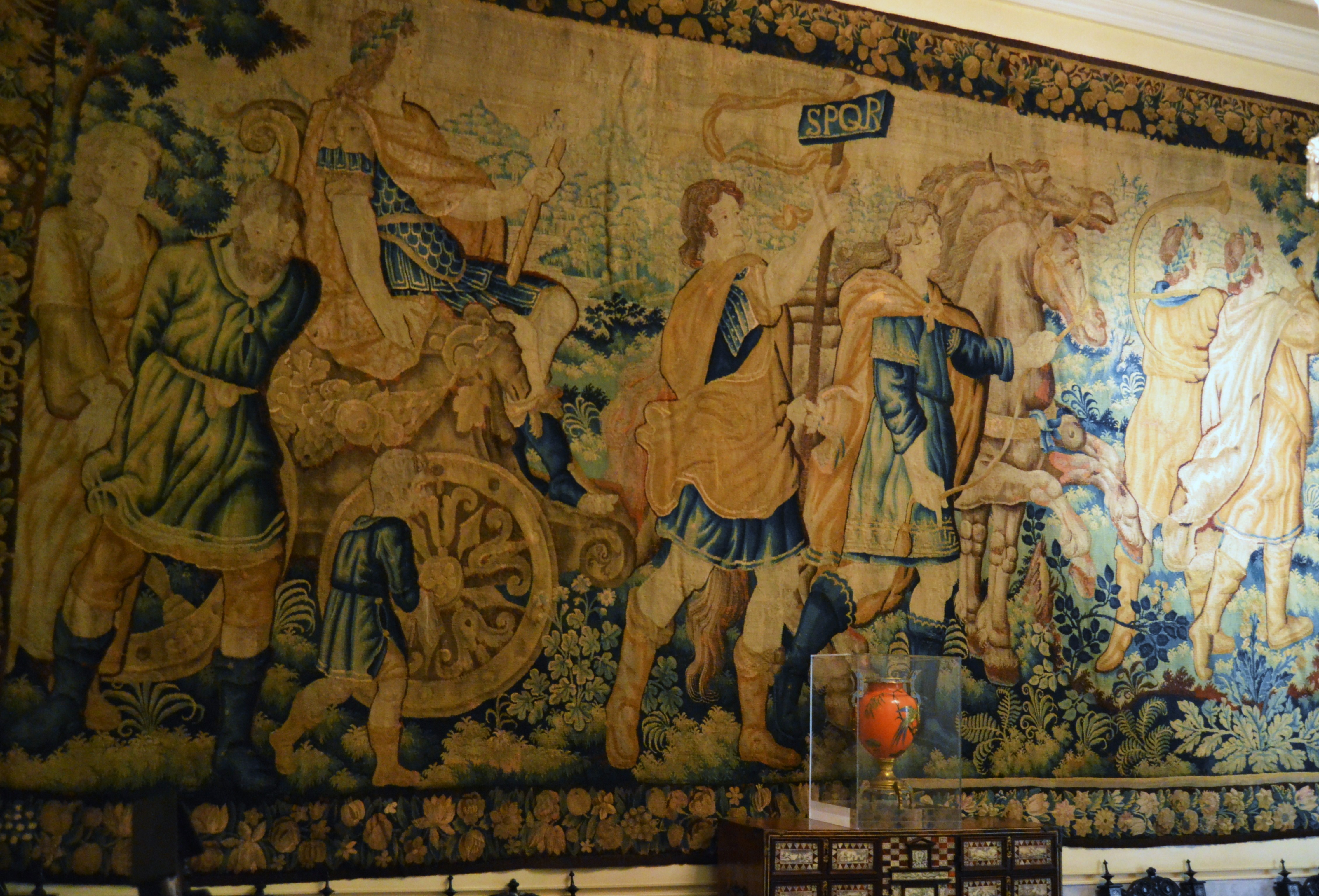 Tapís flamenc amb escena de triomf romà, fumoir del palau del marqués de Dosaigües. Llana i seda, segle XVI.